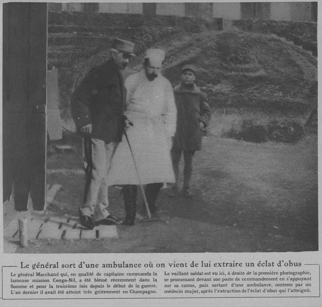 Le général Jean-Baptiste Marchand Marchand, se remet de sa blessure en champagne, il avait refusé de quitter son poste.